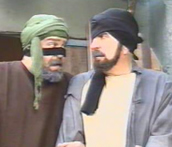 wamadat09